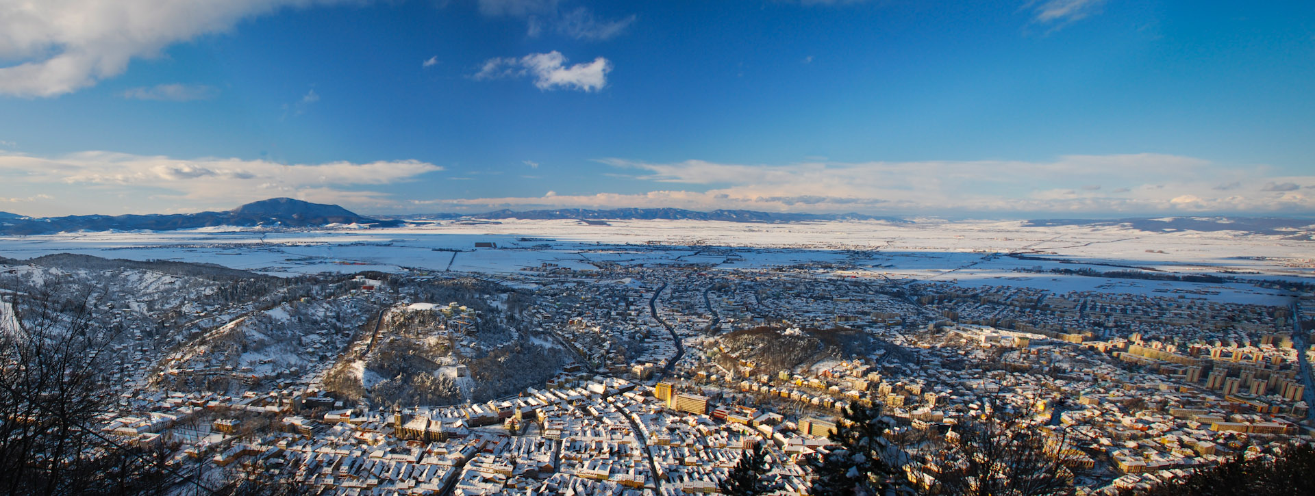 Brașov panoramă, vedere de pe Tâmpa. Cartierul Șcheii Brașovului in prim plan.